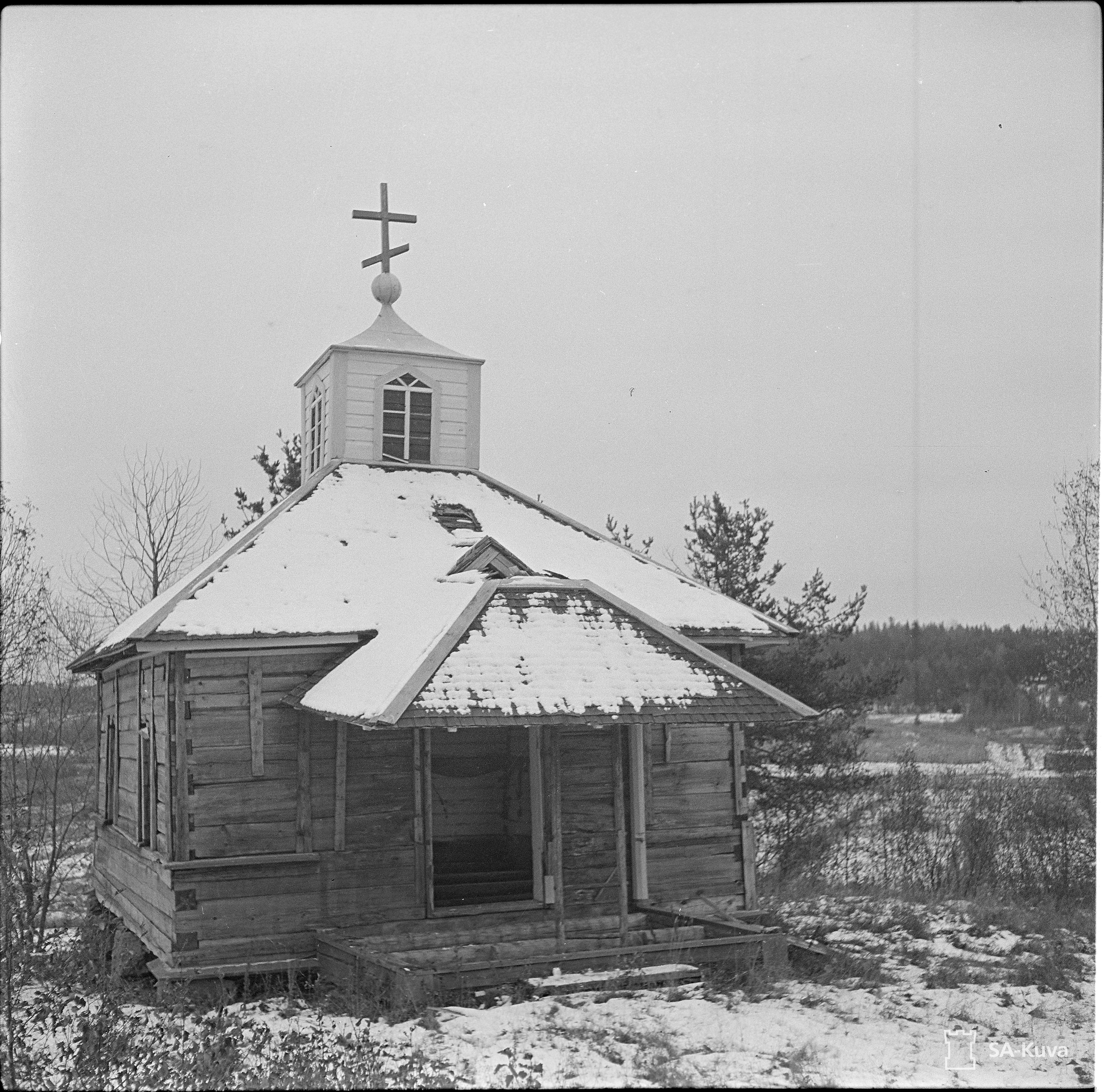 Vakkilan tsasouna lähellä Raudun kirkonkylää.